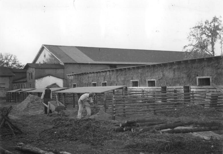 Illus-Klein, 4.10.51 200 Schweinehütten für die VVG Berlins. Noch in diesem Jahr werden auf den Gütern der VVG Gross-Berlin 200 Schweinehütten gebaut. Im Berliner Stadtgebiet werden davon 75 errichtet. Zur Zeit wird auf den Gütern Blankenfelde, Buch, Boddinsfelde, Ziethen und Selchow an den Schweinehütten gebaut. Das gesamte Bauvorhaben soll bis Mitte November fertiggestellt sein. UBz.: Auf dem VE Gut Selchow ist der Bau von Schweinehütten in vollem Gange.